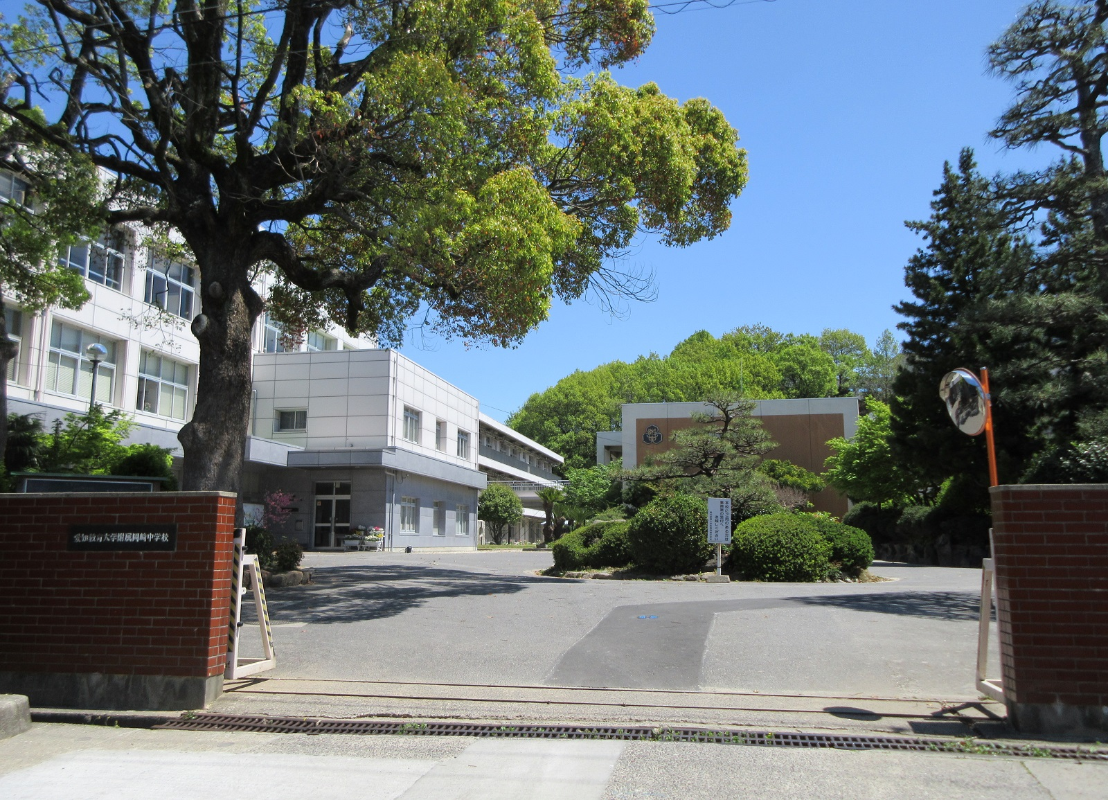 愛知教育大学附属岡崎中学校（岡崎市明大寺町）